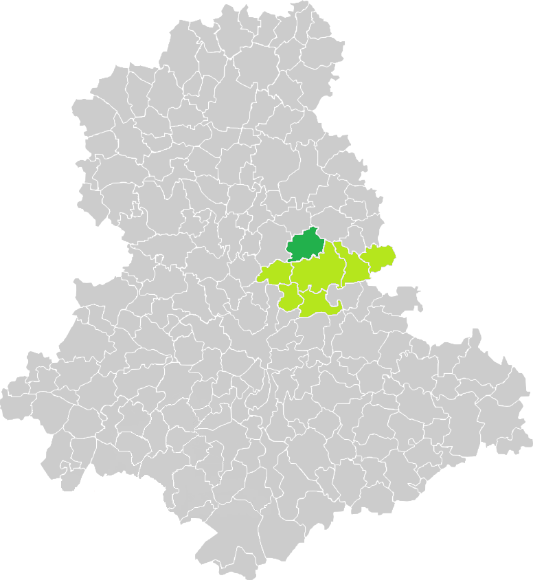 Carte de situation de la commune de Saint-Sylvestre (en vert foncé) dans le votre Canton (en vert clair) sur une carte des communes de la Haute-Vienne